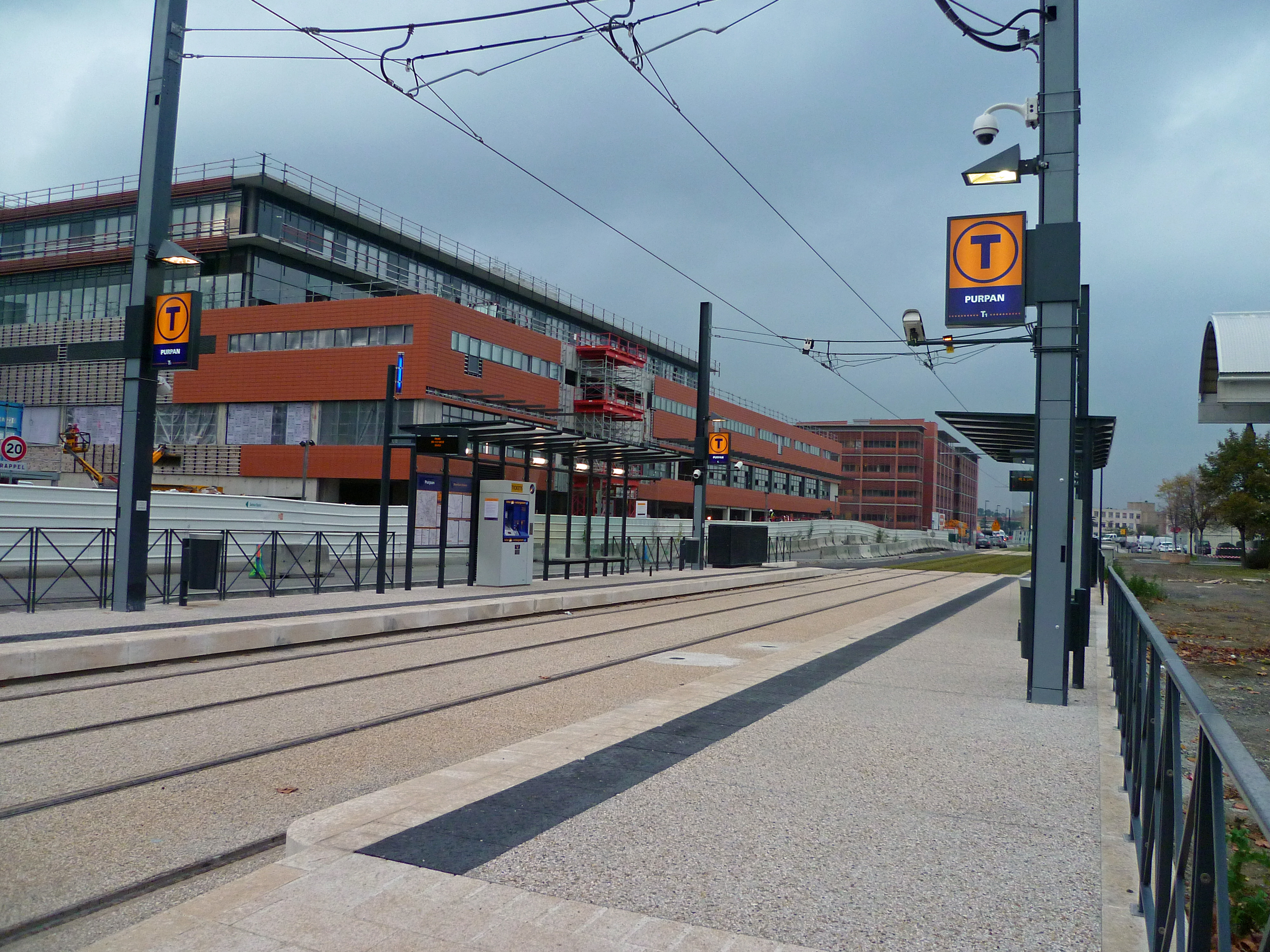 La station Purpan sur la ligne T1 du tramway toulousain et la clinique Pierre-Paul Riquet en construction.